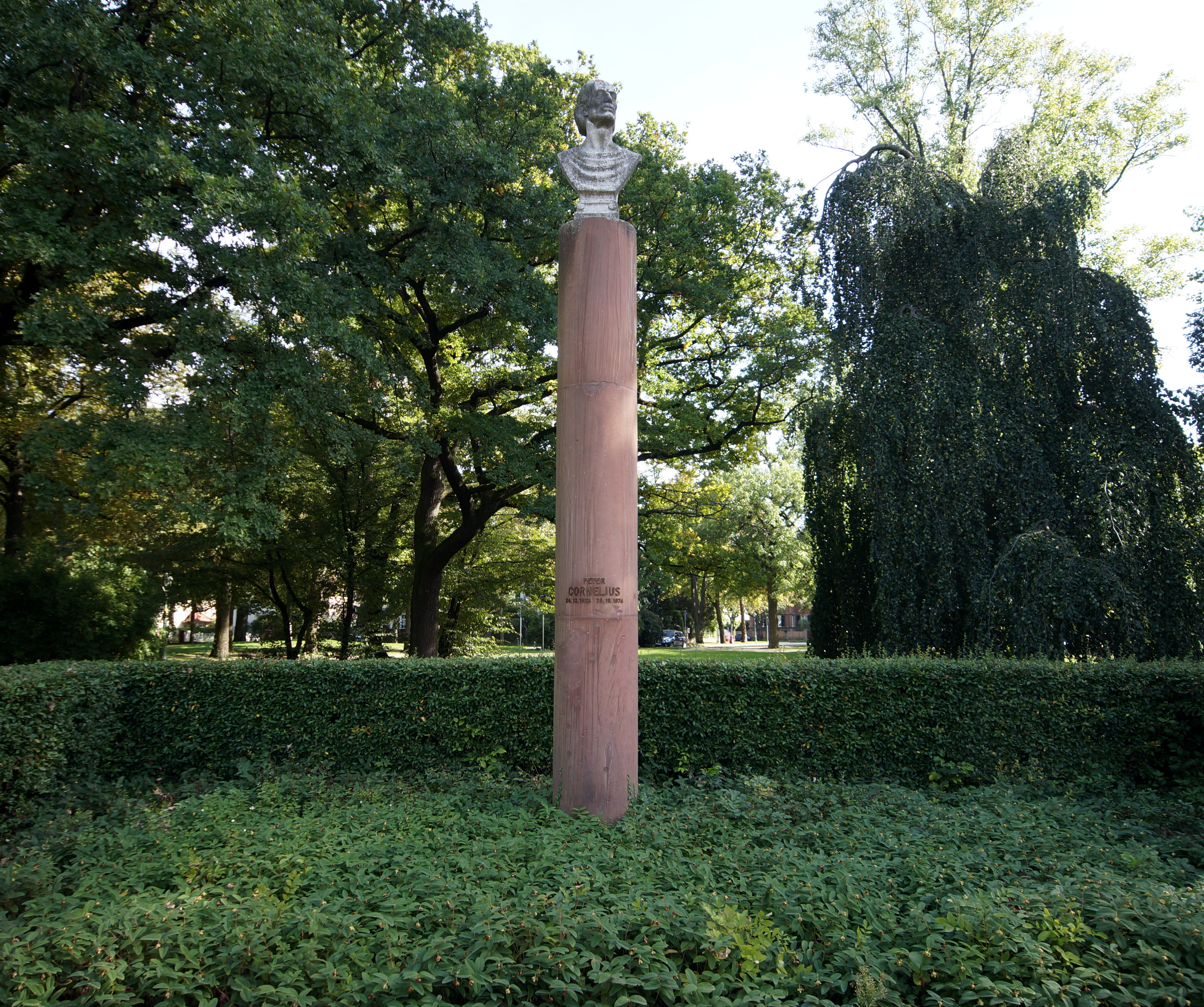 Denkmal für den Komponisten Peter Cornelius (24. Dezember 1824–26. Oktober 1874) im Park Drususwall der Grüngürtel-Promenade in Mainz-Oberstadt.